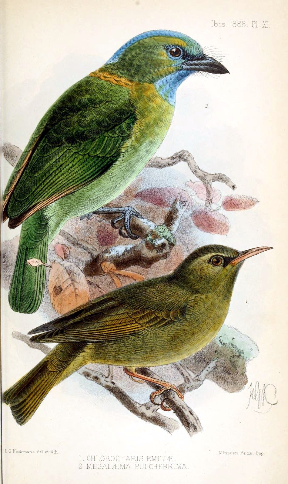 Chlorocharis emiliae & Megalaema pulcherrima